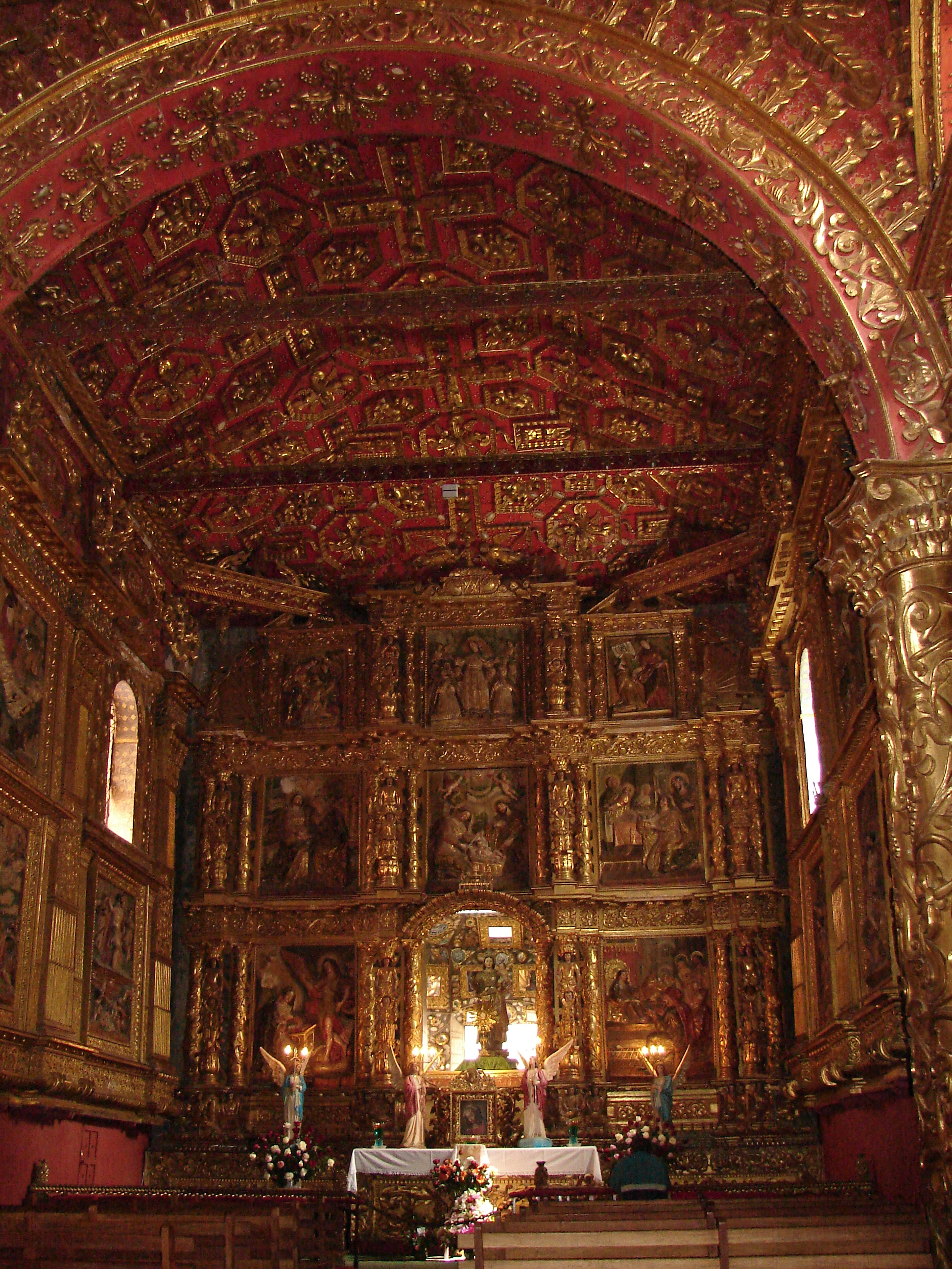 Sector Antiguo de la ciudad de Tunja: Iglesia de Santo Domingo, Boyacá. Colombia. Vista con aumento del altar, nóternse los adornos de oro.